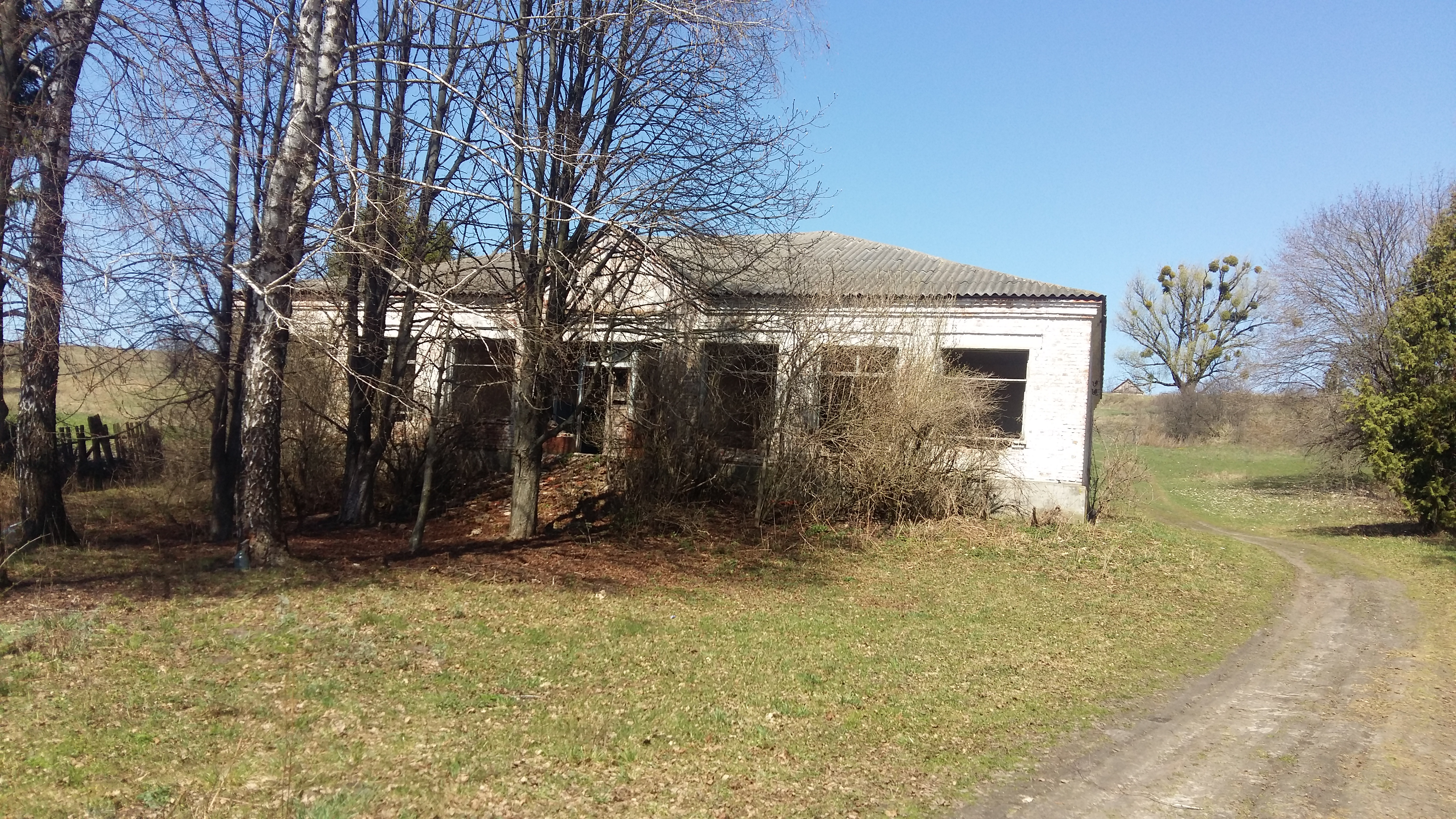 Школа села Викторово